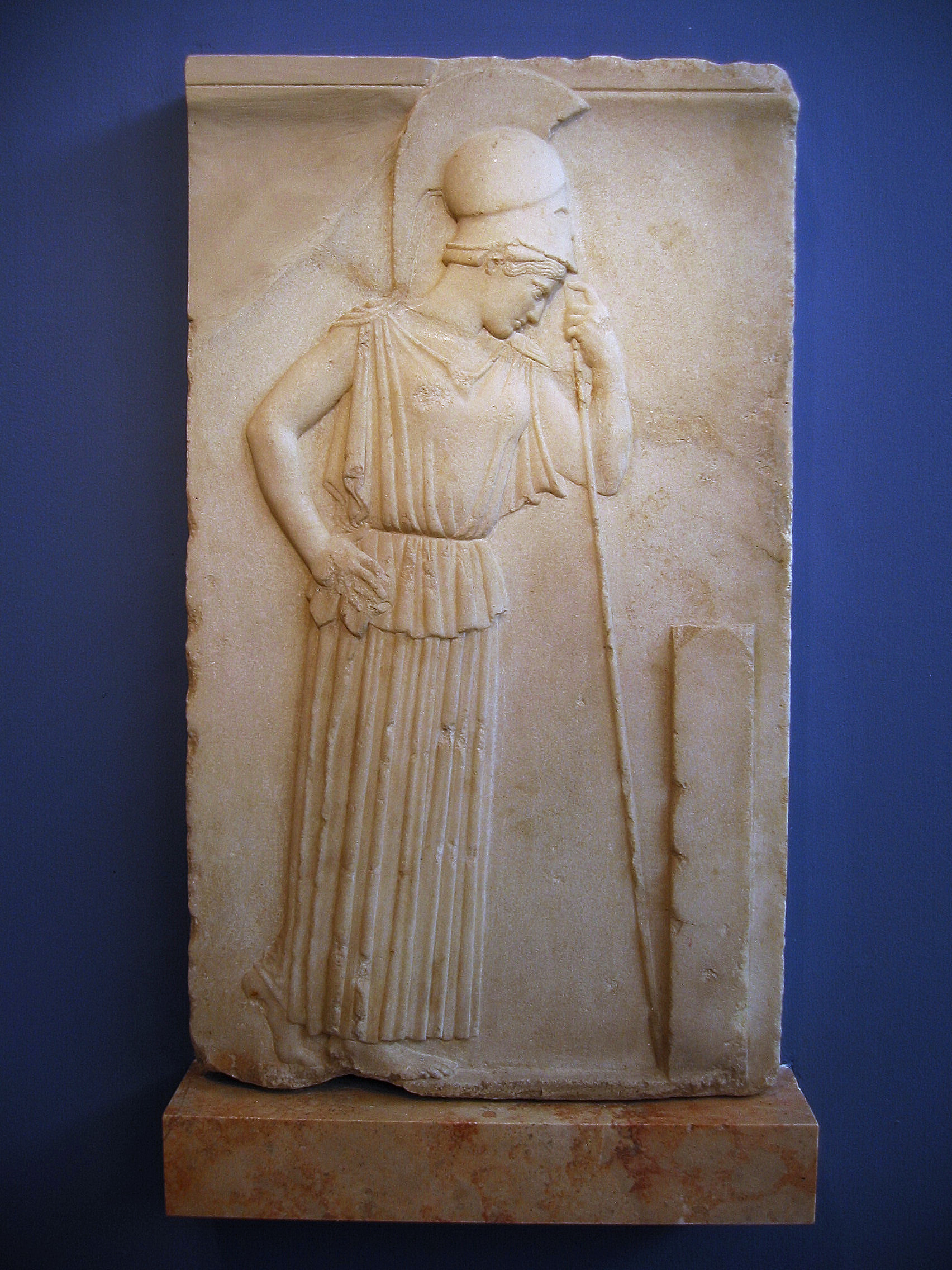 Musée de l'Acropole. Athéna pensante. Photo prise par Harrieta171 le 21/01/06